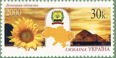 Почтовая марка Украины серии «Регионы и административные центры Украины». Донецкая область. Номер в каталоге Michel: 319 (M 379)